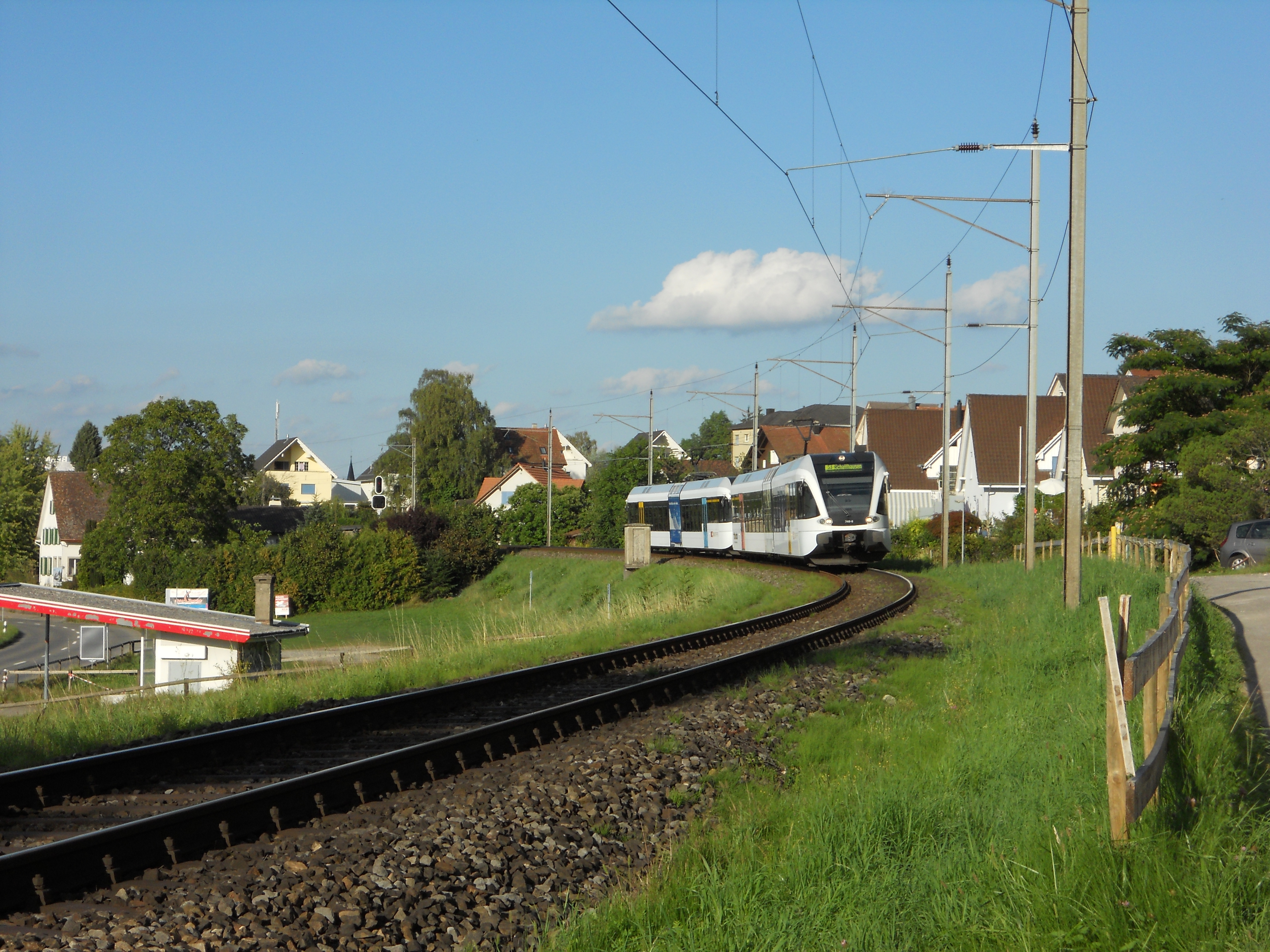 Ein Thurbo Zug bei Steckborn, Thurgau.